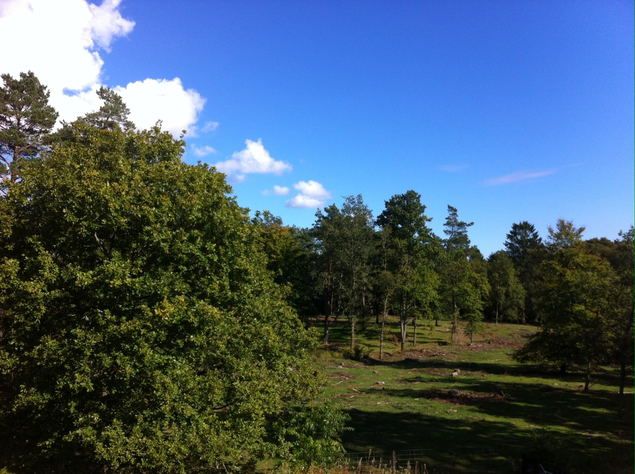 Linddalene ved Hadsund